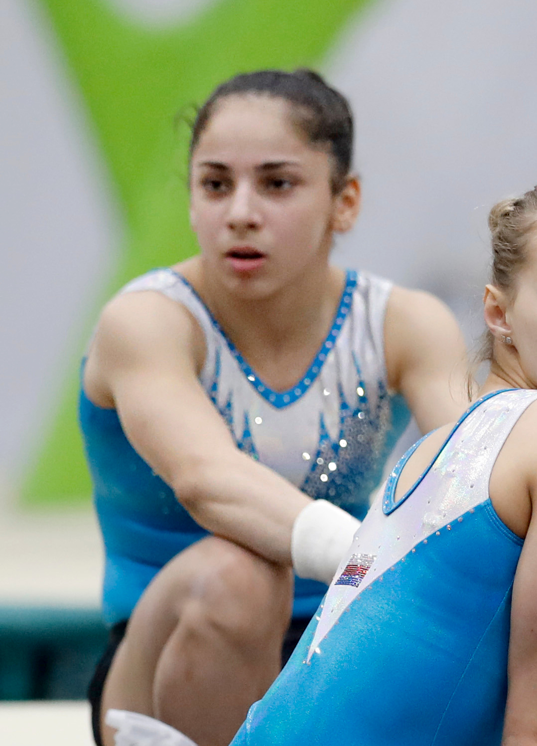 Rio de Janeiro - Equipe de ginástica artística da Rússia treina no Parque dos Atletas para os Jogos Olímpicos Rio 2016 (Fernando Frazão/Agência Brasil)